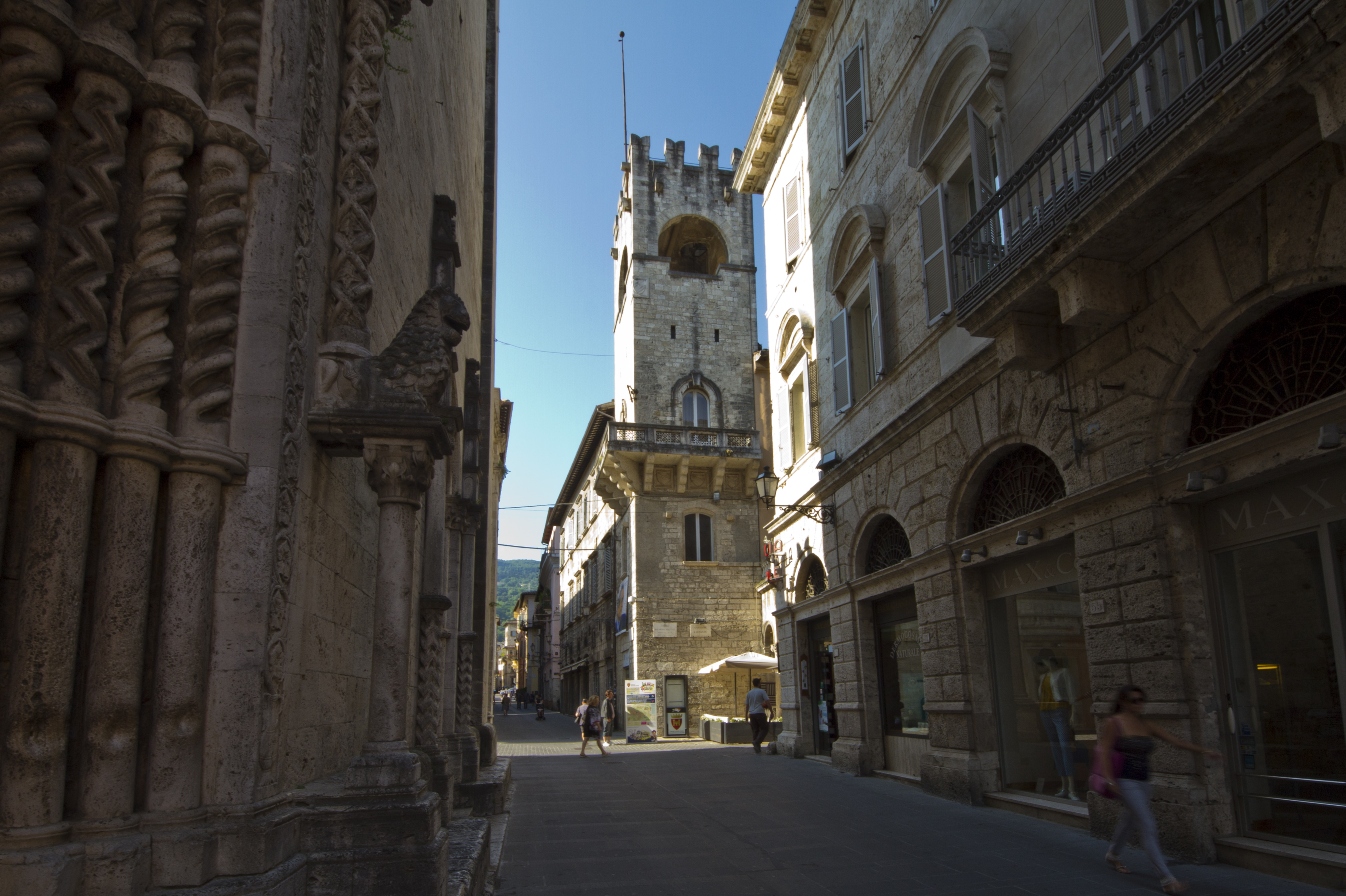 centro storico, 63100 Ascoli Piceno AP, Italy